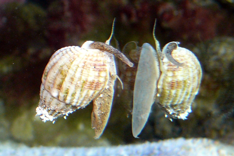 Nassarius sp.